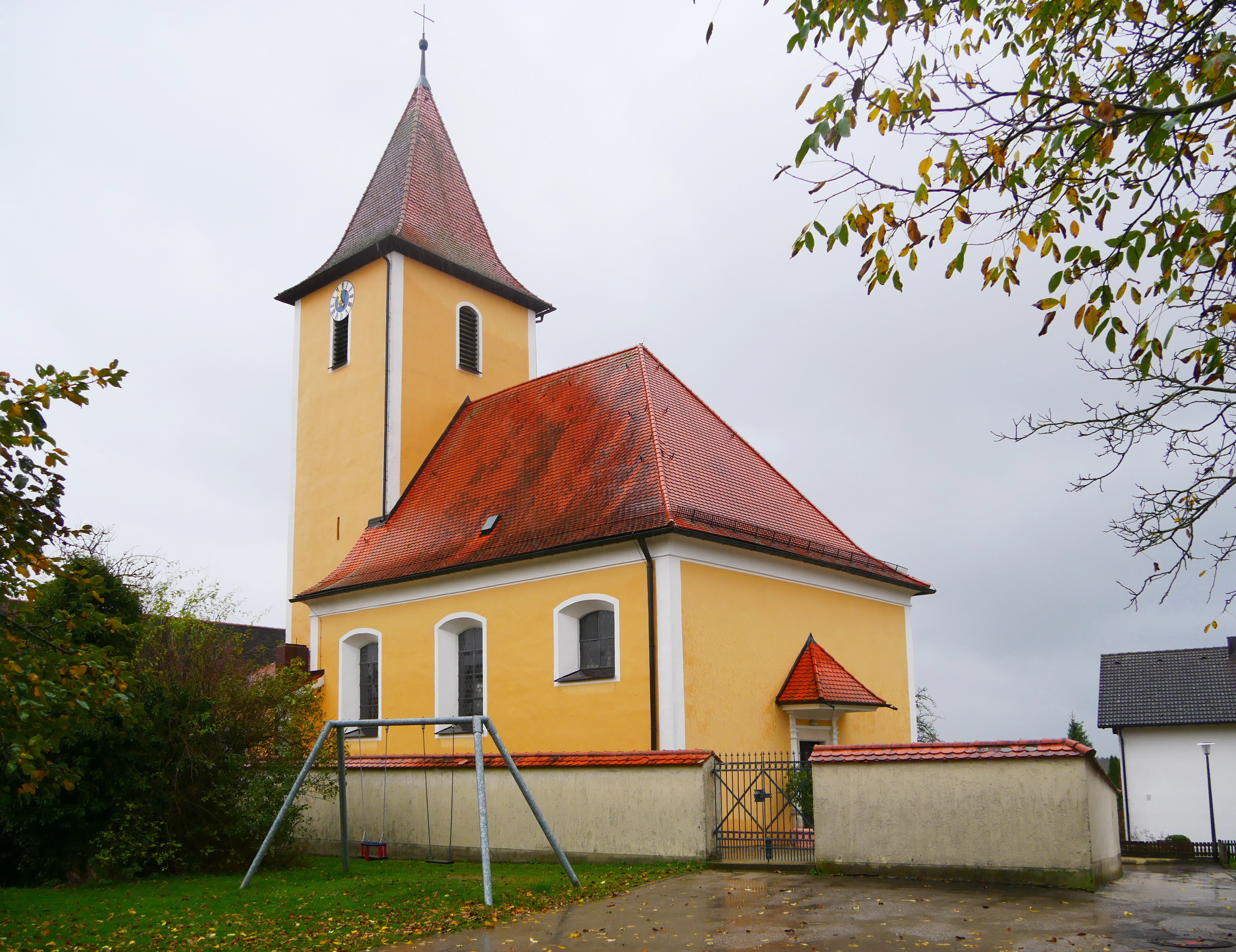 Dörndorf (Gde. Denkendorf), Kirchstr.6, Katholische Pfarrkirche. Die Kirche ist nach Papst Sixtus II (257-258 n. Chr.) benannt. Dieser übergab nach der Heiligenlegende die Kirchenschätze dem Schüler seines Vertrauens, (dem späteren Hl.) Laurentius, bevor sie der römische Kaiser an sich reißen konnte. Dieses Motiv wird auch am Hochaltar dargestellt. Ansicht von NW